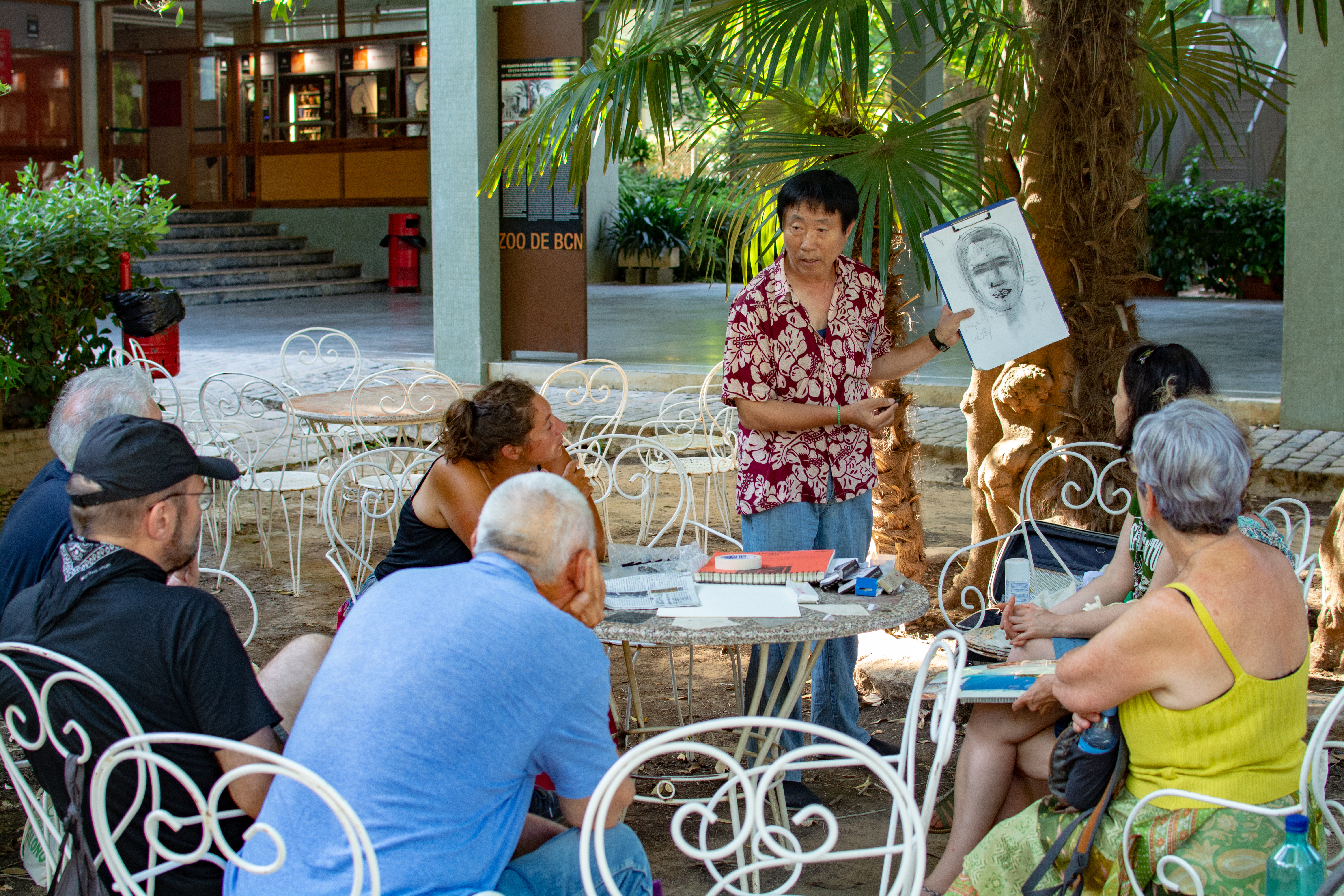 Arta kurso dum la SAT-Kongreso 2019